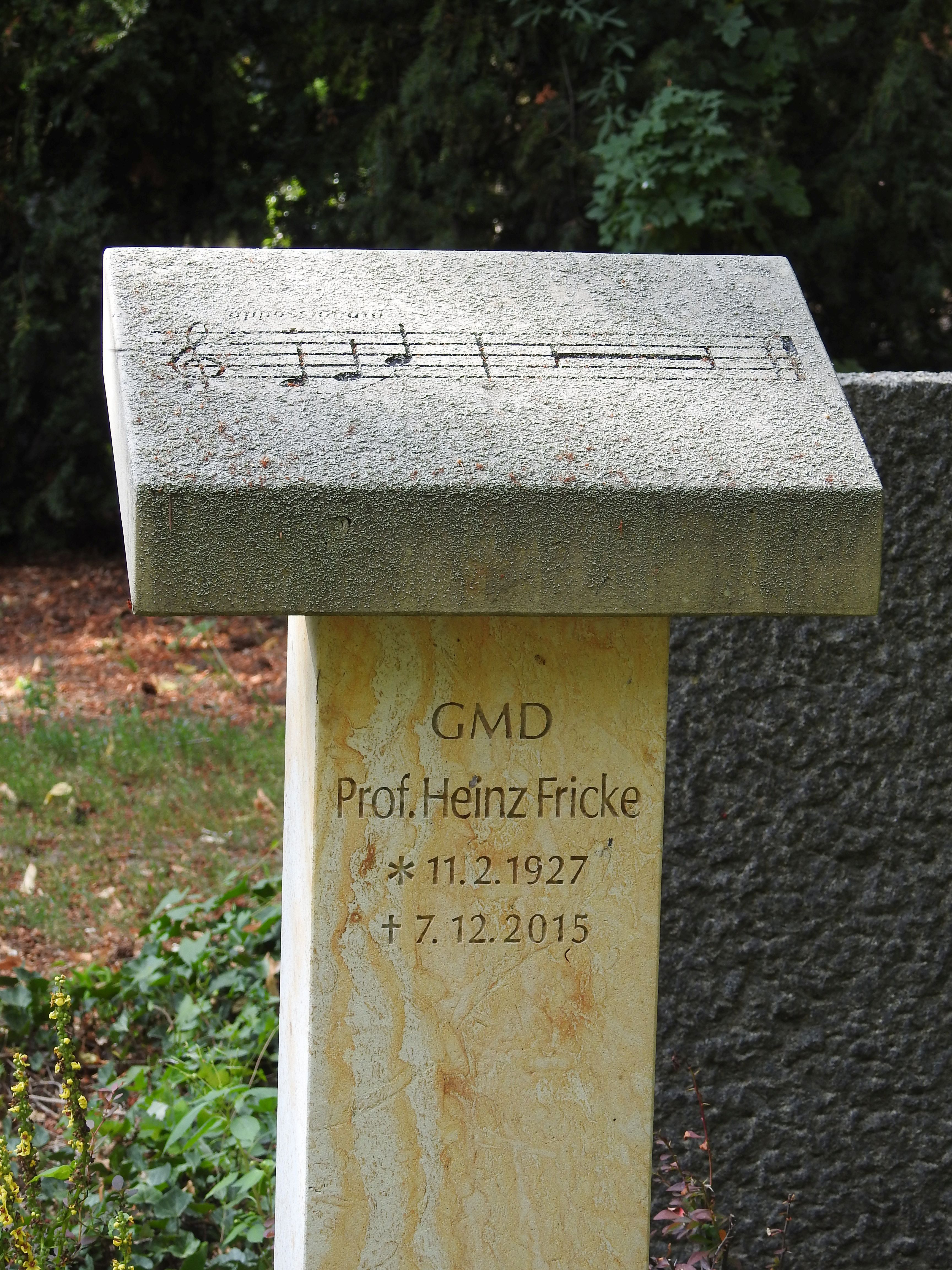 Grab von Prof. Heinz Fricke auf dem Friedhof Pankow III (Grabstelle 1-140) in Berlin